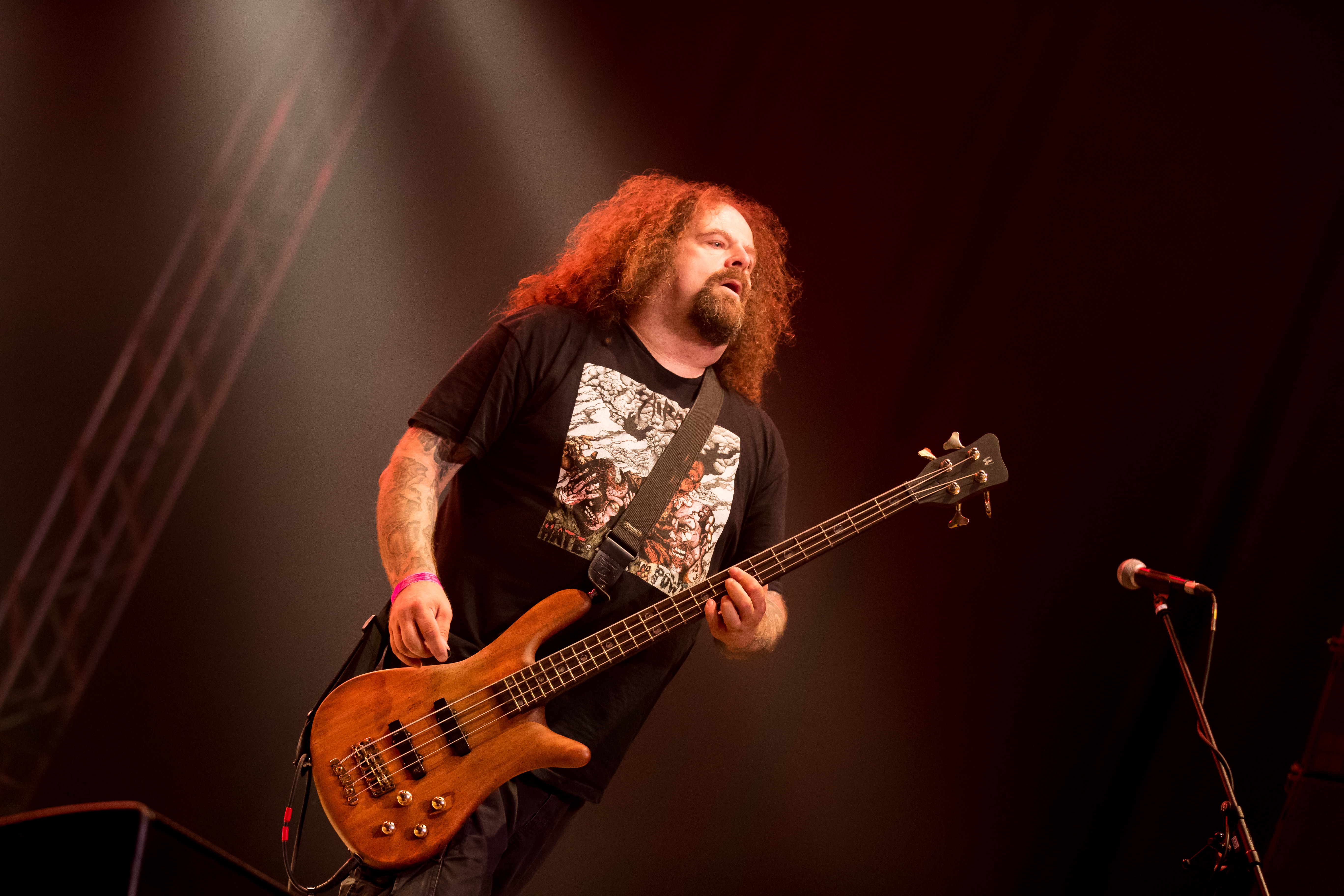 Napalm Death during Wacken Open Air at Schleswig-Holstein, Wacken, , Germany on 2017-08-03, Photo: Sven Mandel